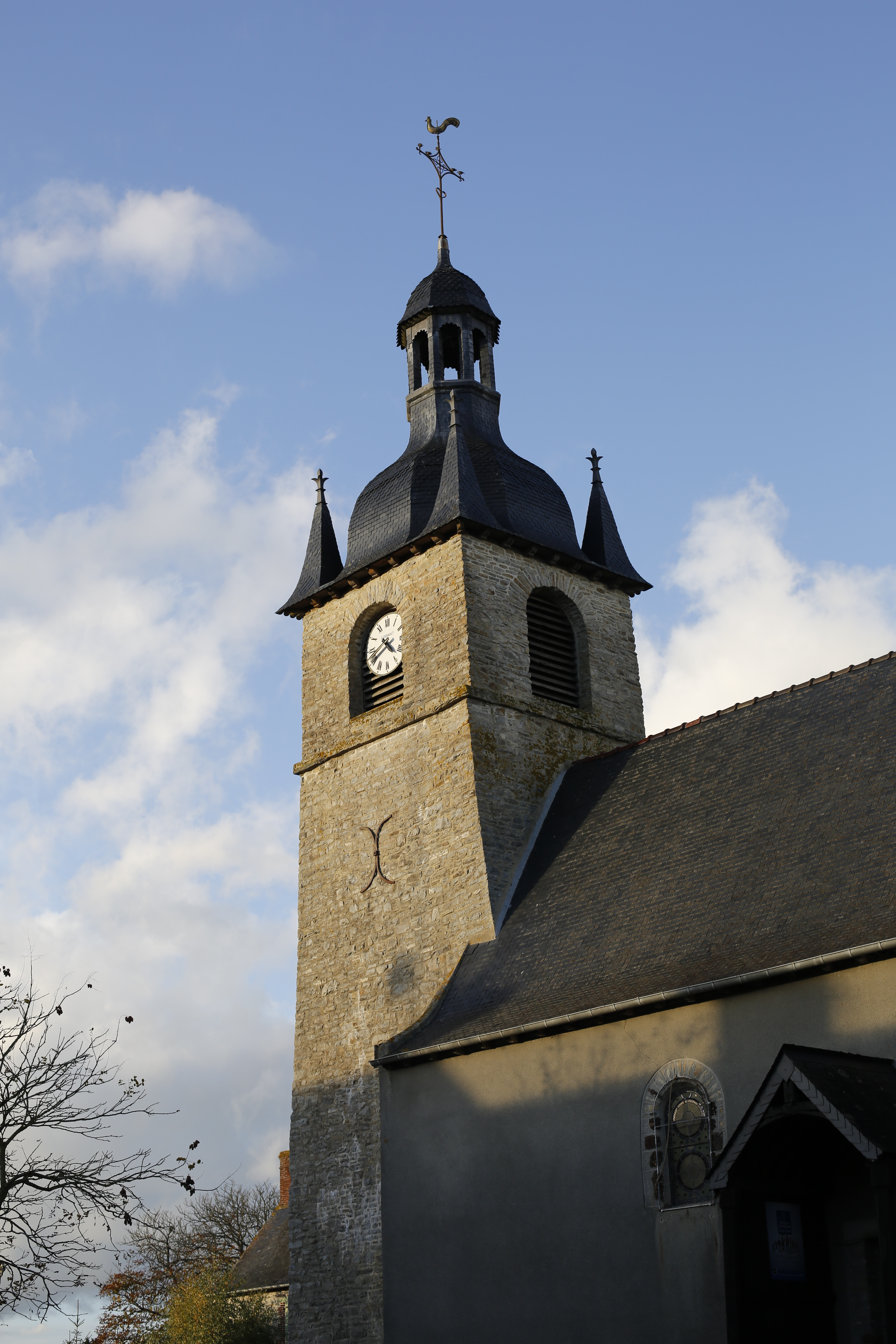 Église de La Couyère (Ille-et-Vilaine, Bretagne, France).